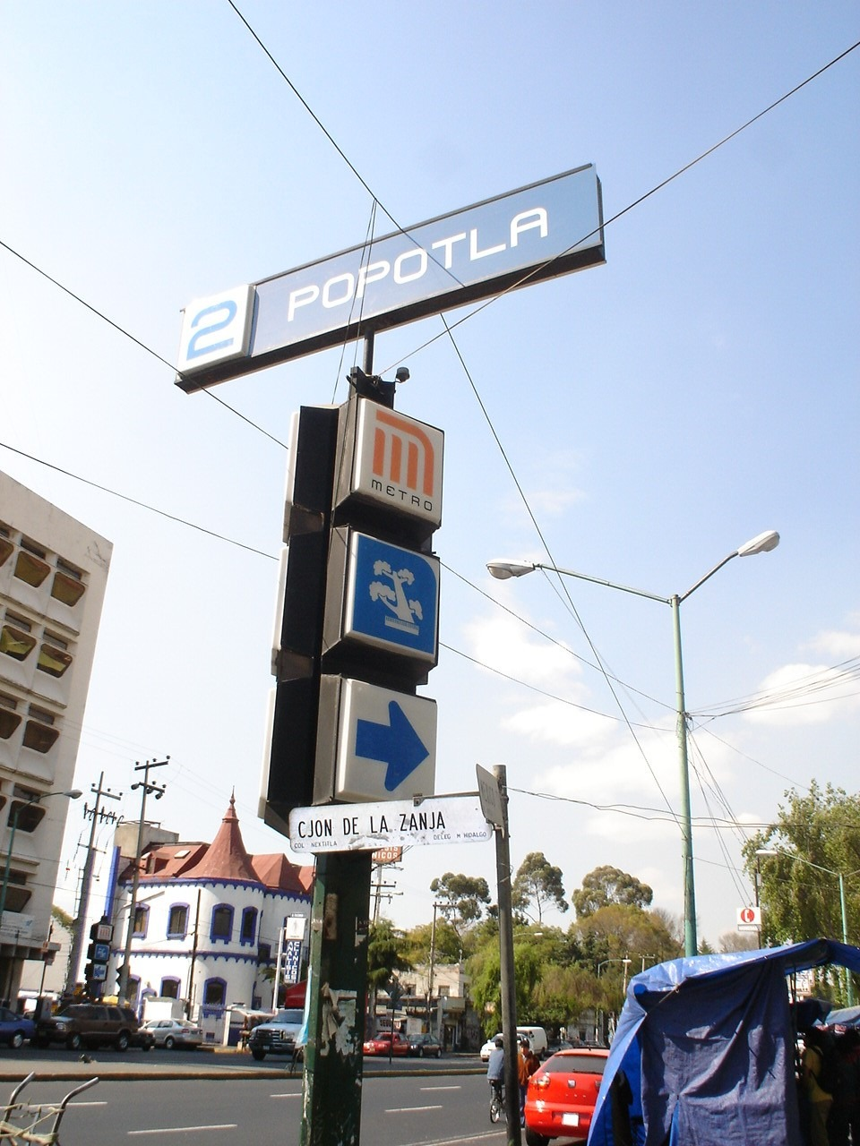 ESTACION POPOTLA Date: 22 12 2006